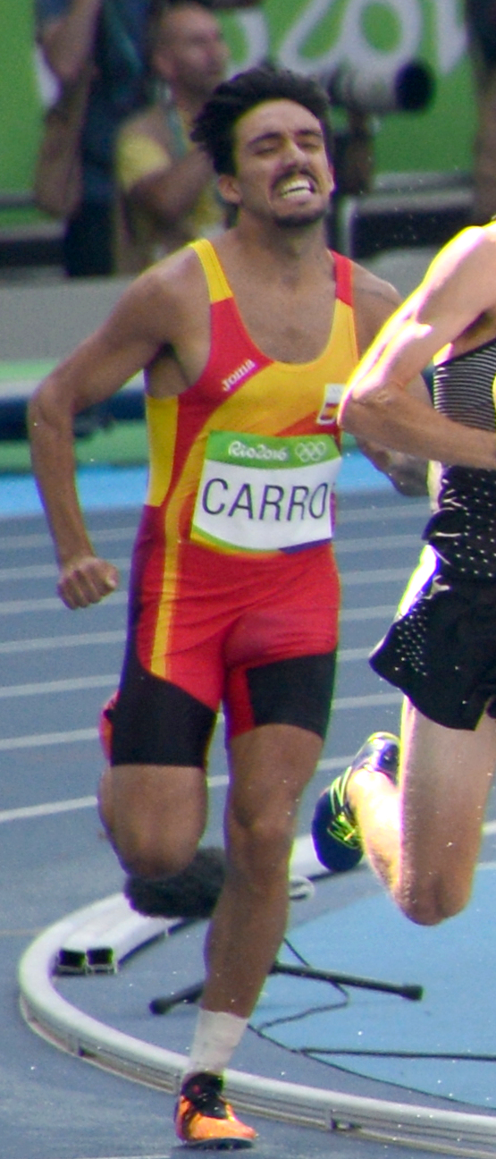 Série du 3000m steeple Homme des JO de Rio, 2016